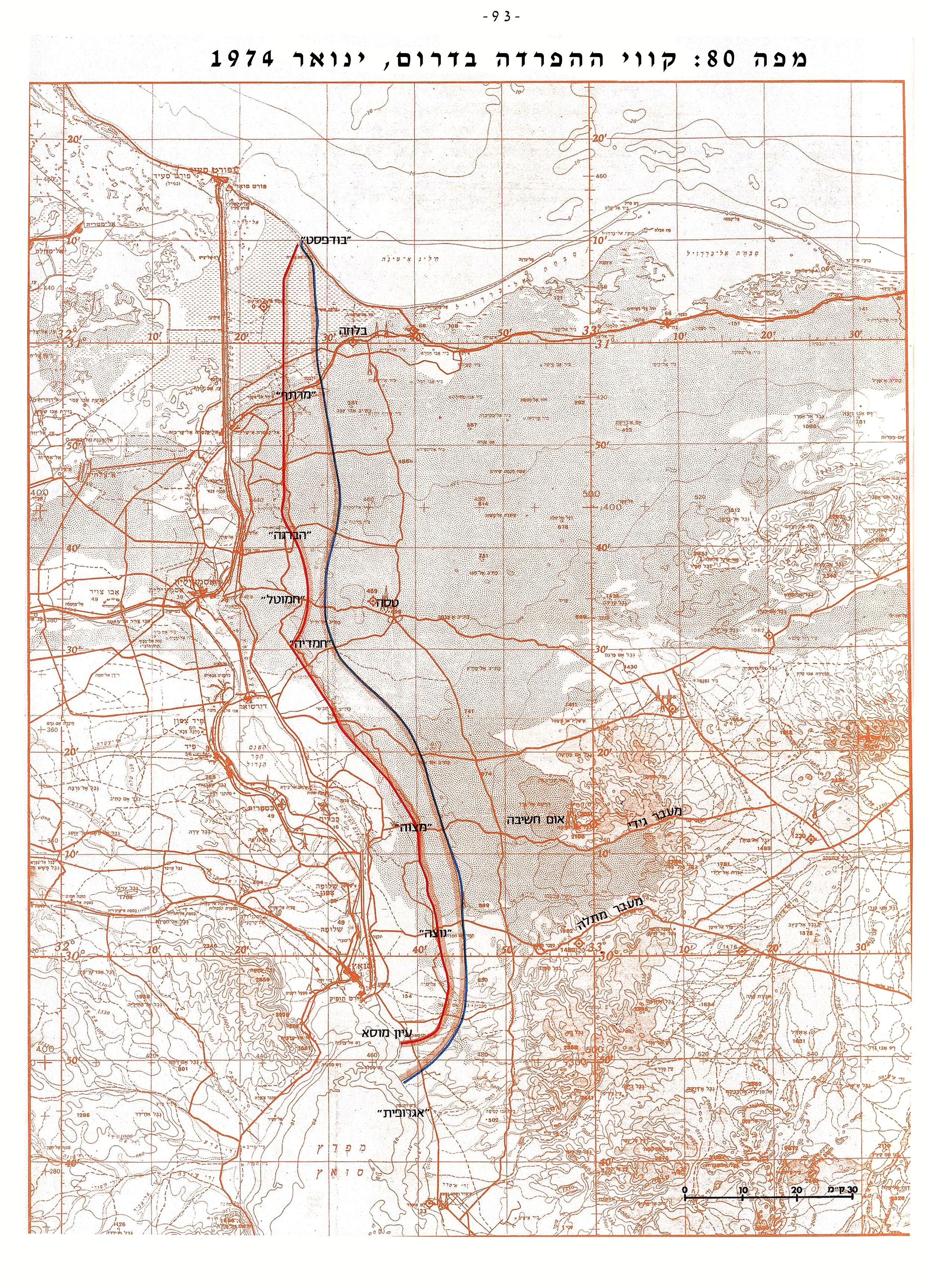 אטלס מלחמת יום הכיפורים. מפה 80 - קווי ההפרדה בדרום, ינואר 1974 - מלחמת יום הכיפורים